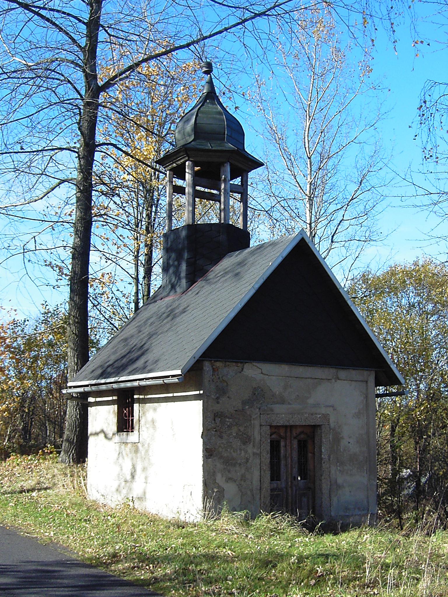 Kaple Nejsvětějšího Srdce Ježíšova Salmov (2005)